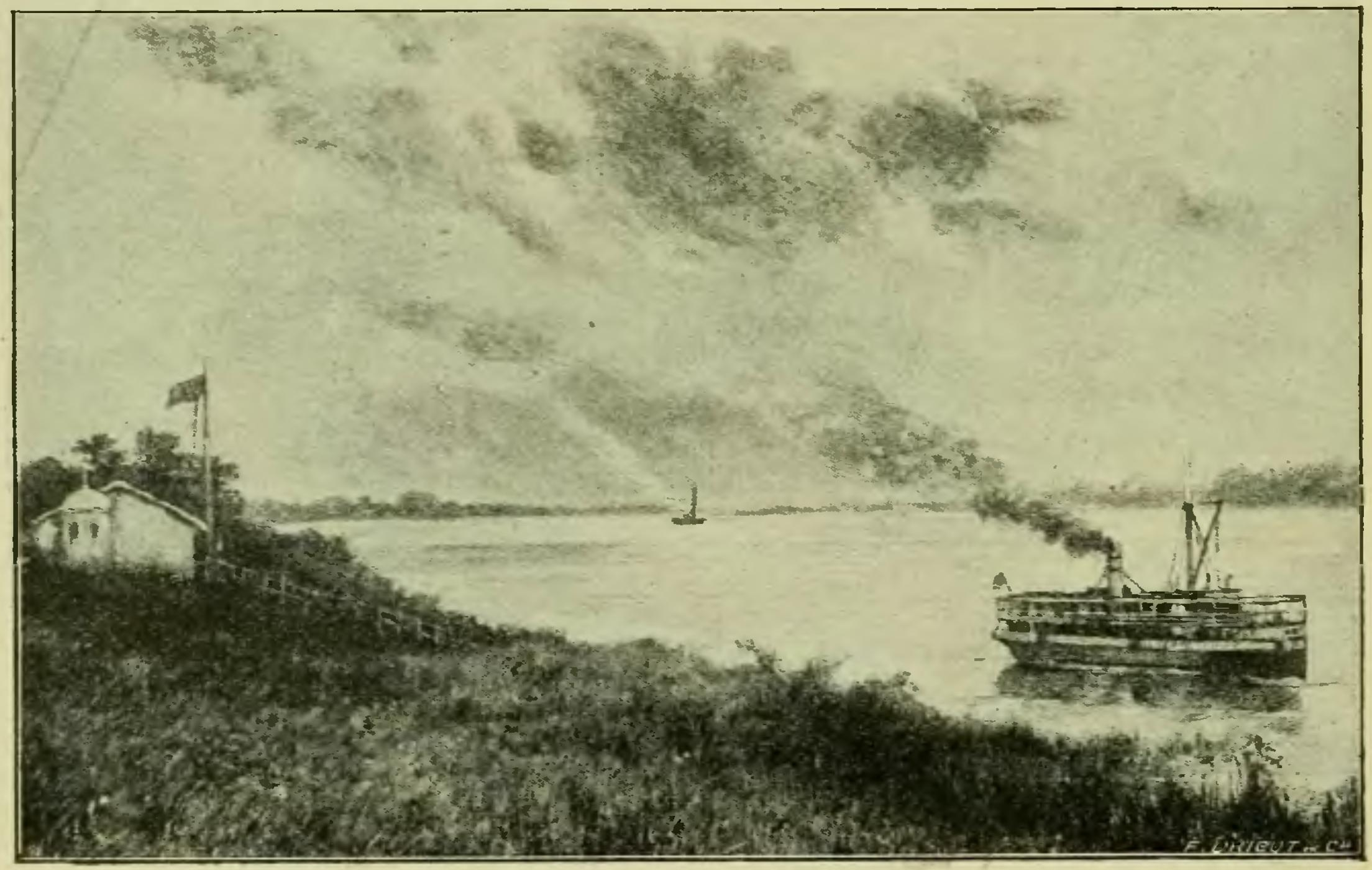 Entrada do Rio Amazonas, c.1903